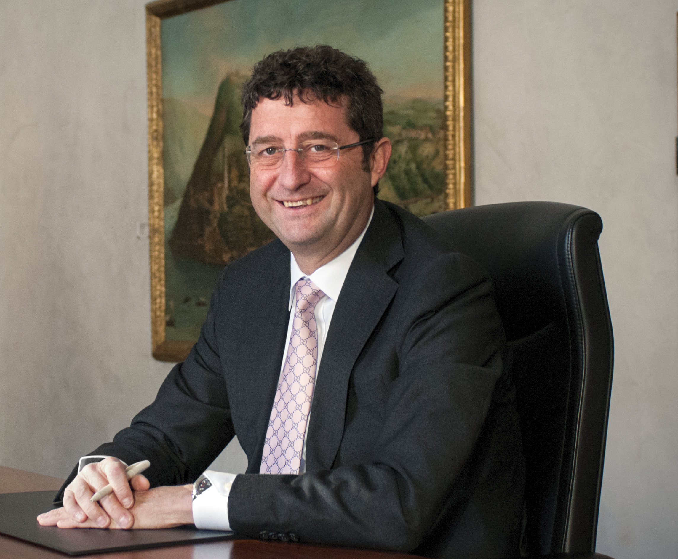 Consigliere di Stato Paolo Beltraminelli